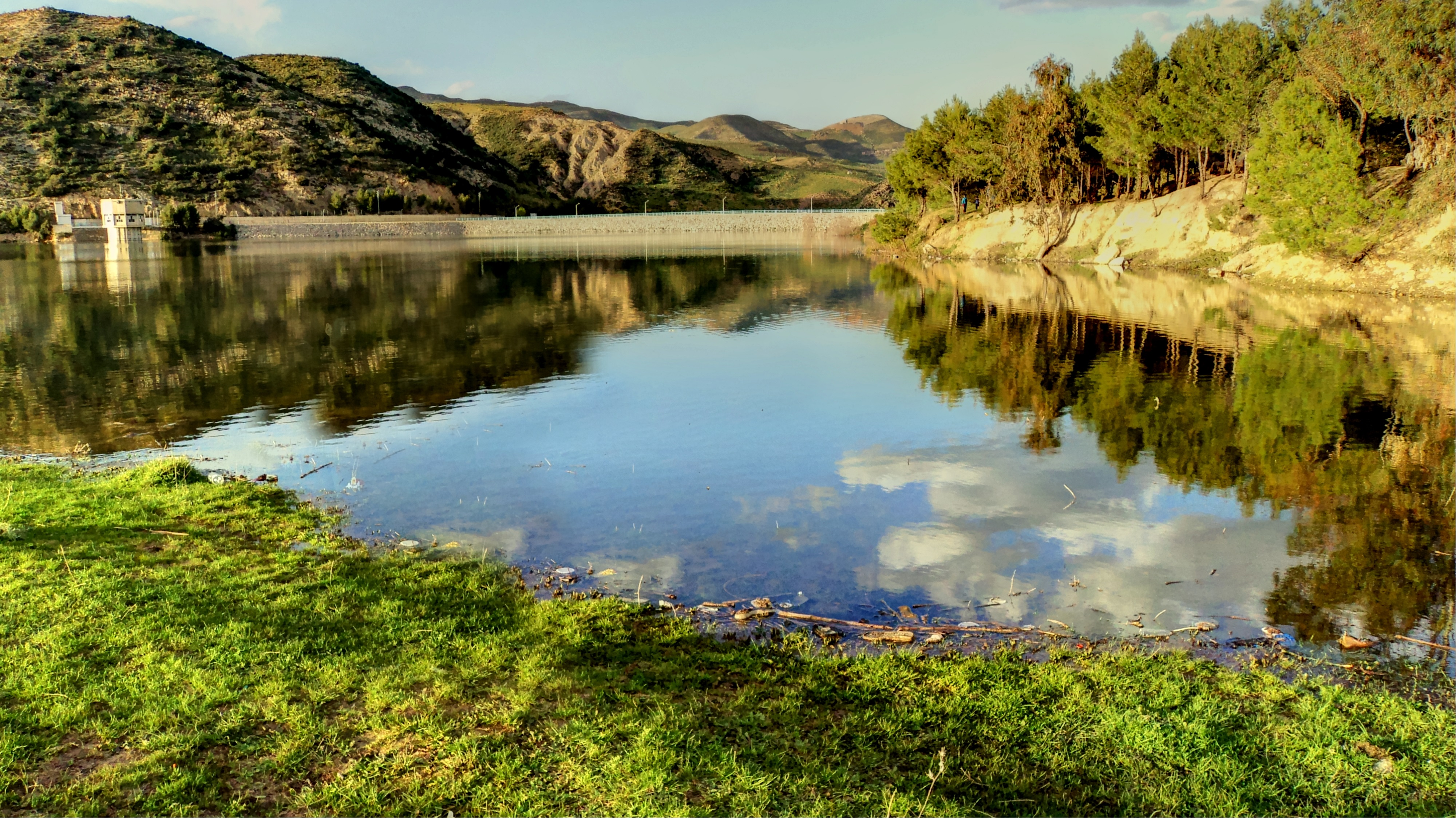 Paysage de grand barrage de Souk Ahras .Algerie